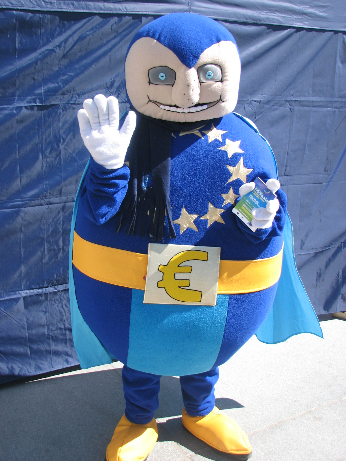 Euromees Euroopa päeva tähistamisel Vabaduse väljakul